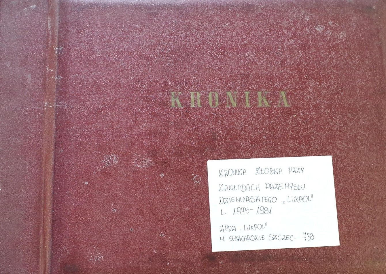 Stargard. Kronika żłobka Luxpolu